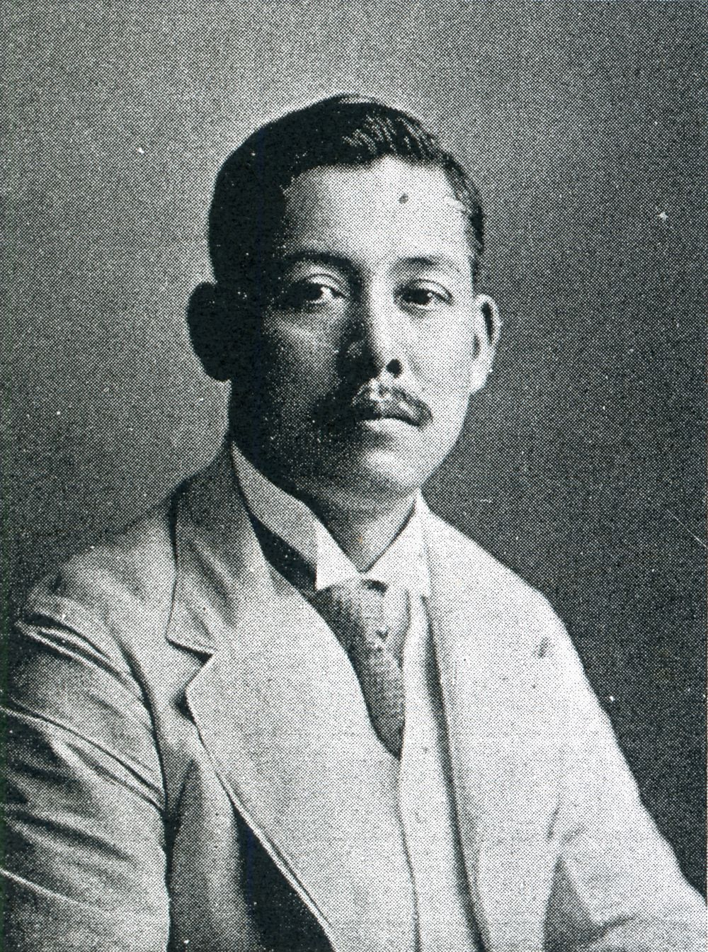 この写真は、川崎克（1880-1949）の1929年頃の写真です。